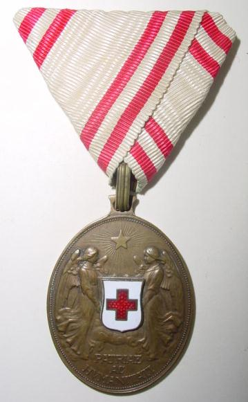 Osztrák Vöröskereszt Díszjelvényének Bronzérme